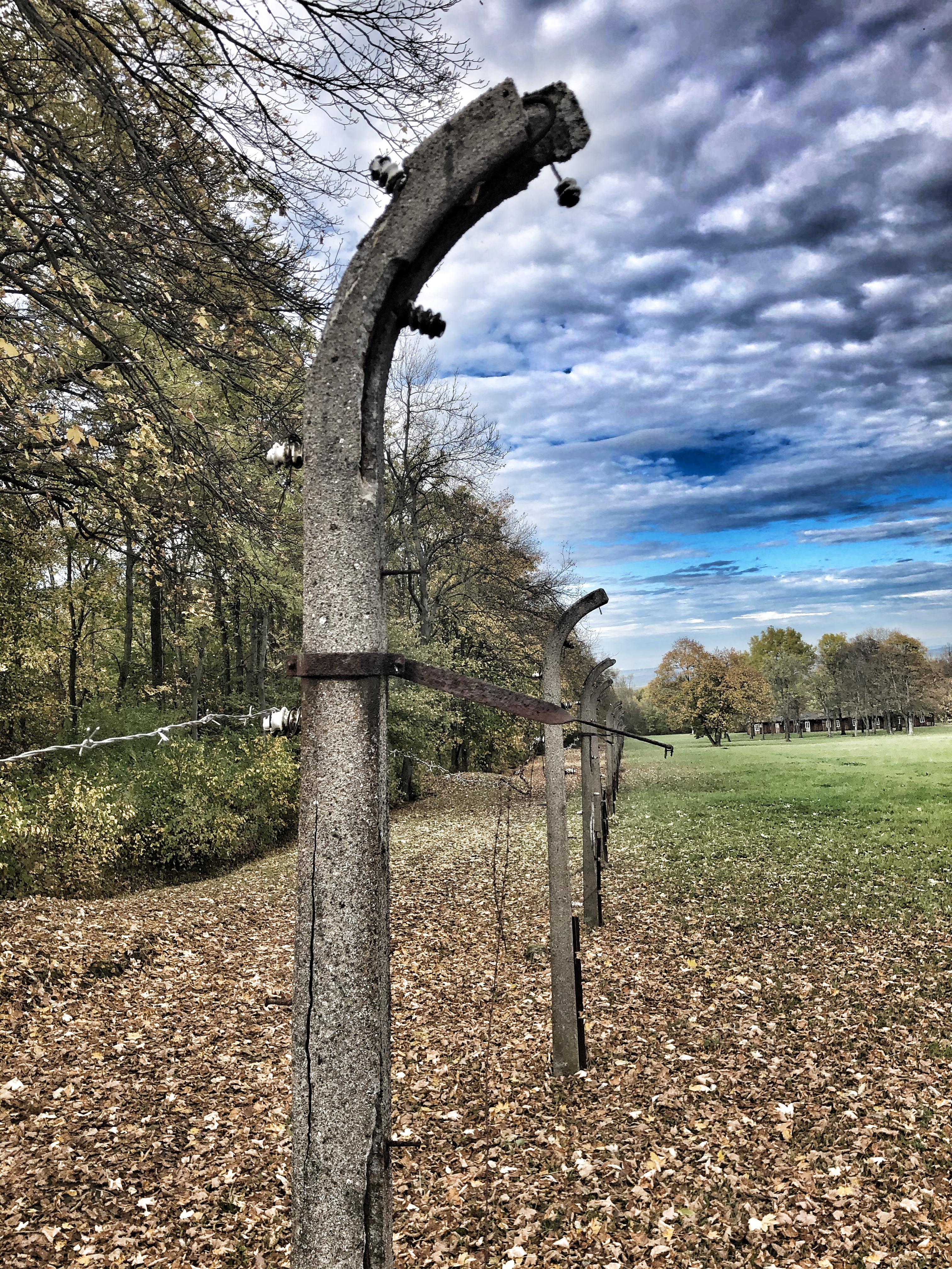 Sicherungszaun des KZ Buchenwald